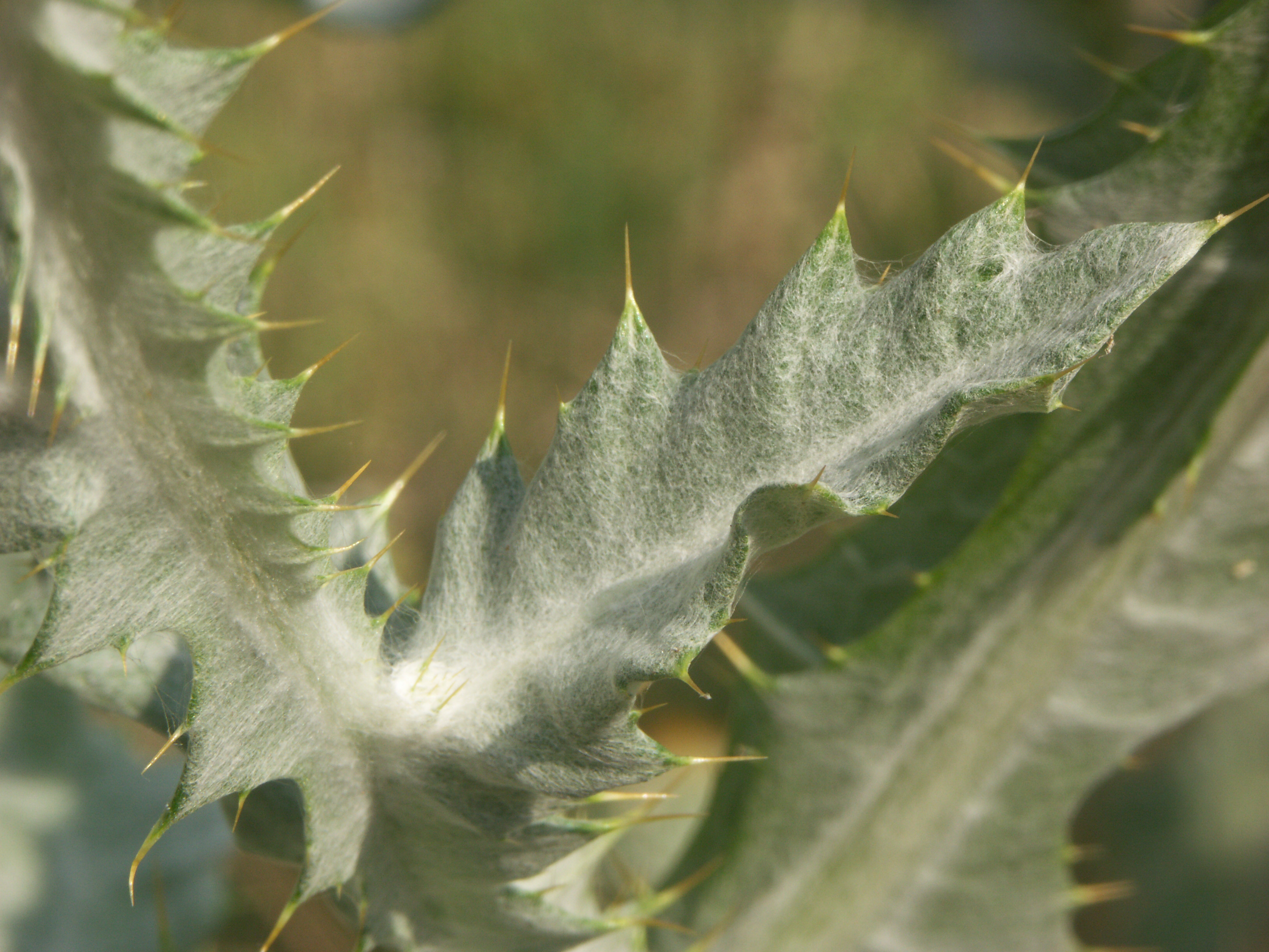 Eselsdistel, Blattdetail (Onopordum acanthium), det. User:Franz Xaver Bildautor: Rüdiger Kratz, St. Ingbert, bei Nennung des Bildautors "gemeinfrei" Aufnahmeort: Deutschland, Rheinland-Pfalz, Bärenbrunnertal bei Dahn, Blattdetail der Eselsdistel Aufnahmedaturm: Frühsommer 2005